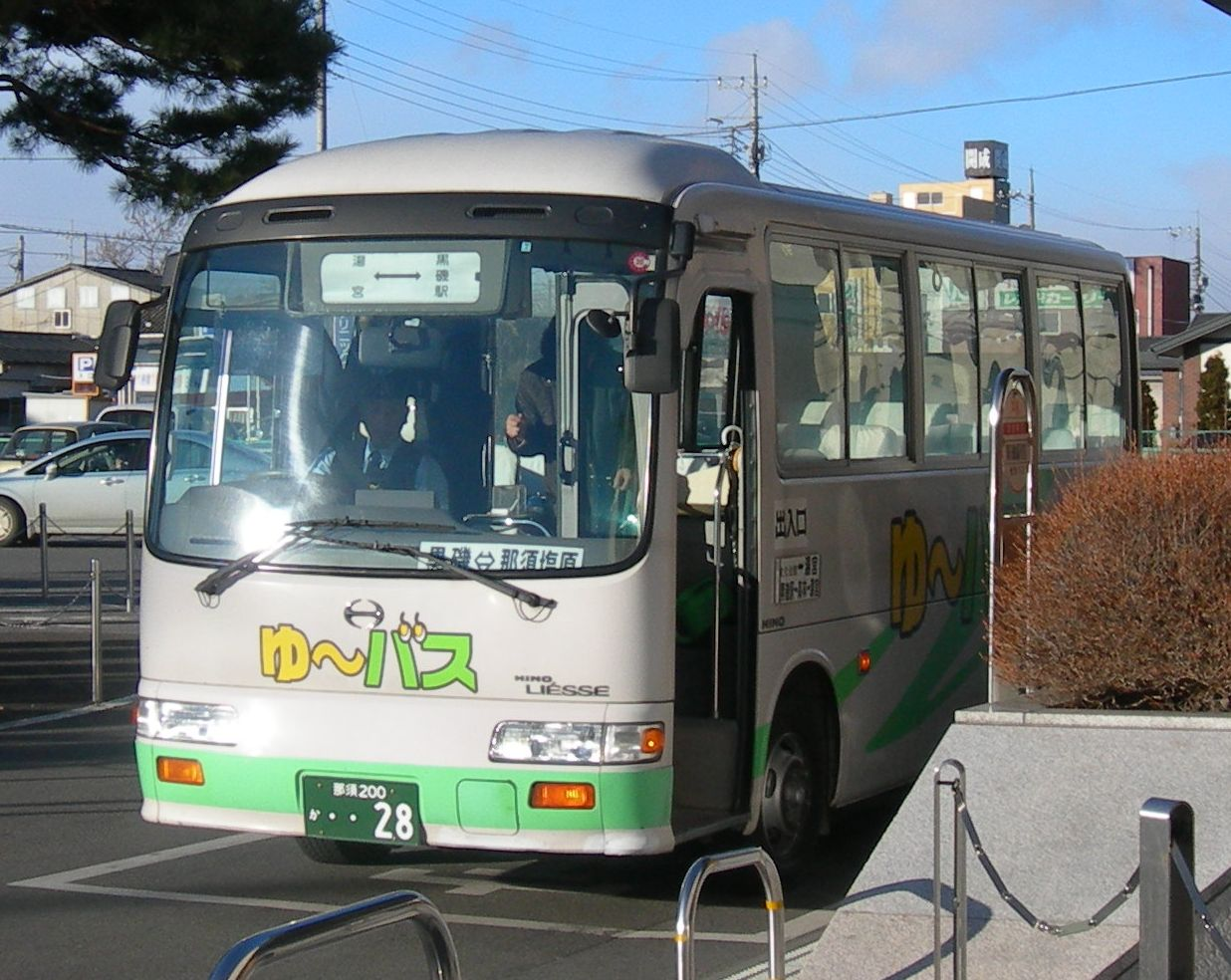 那須塩原市営バス湯宮線ja:やしお観光バス